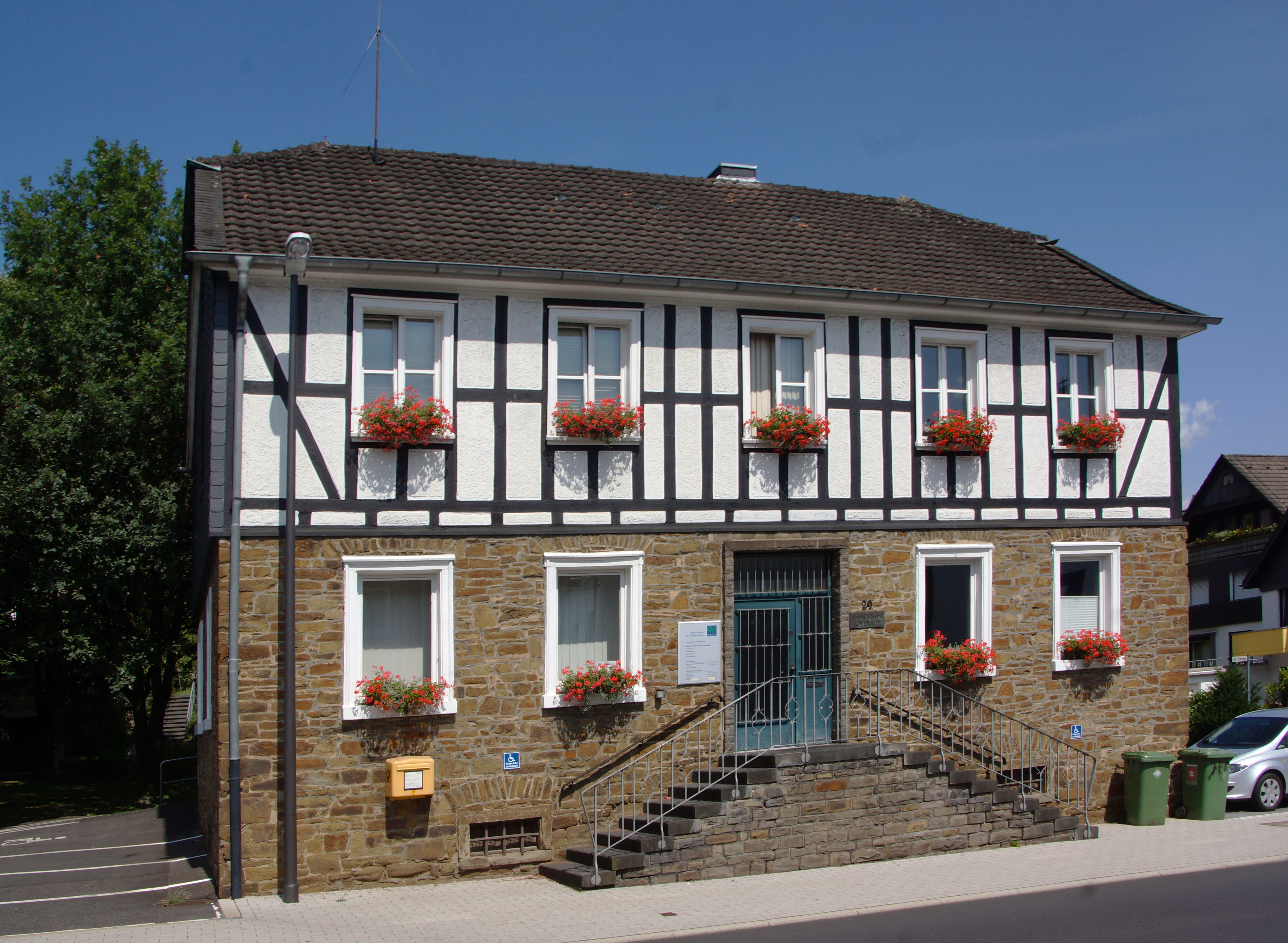 Gebäude des Standesamts Overath